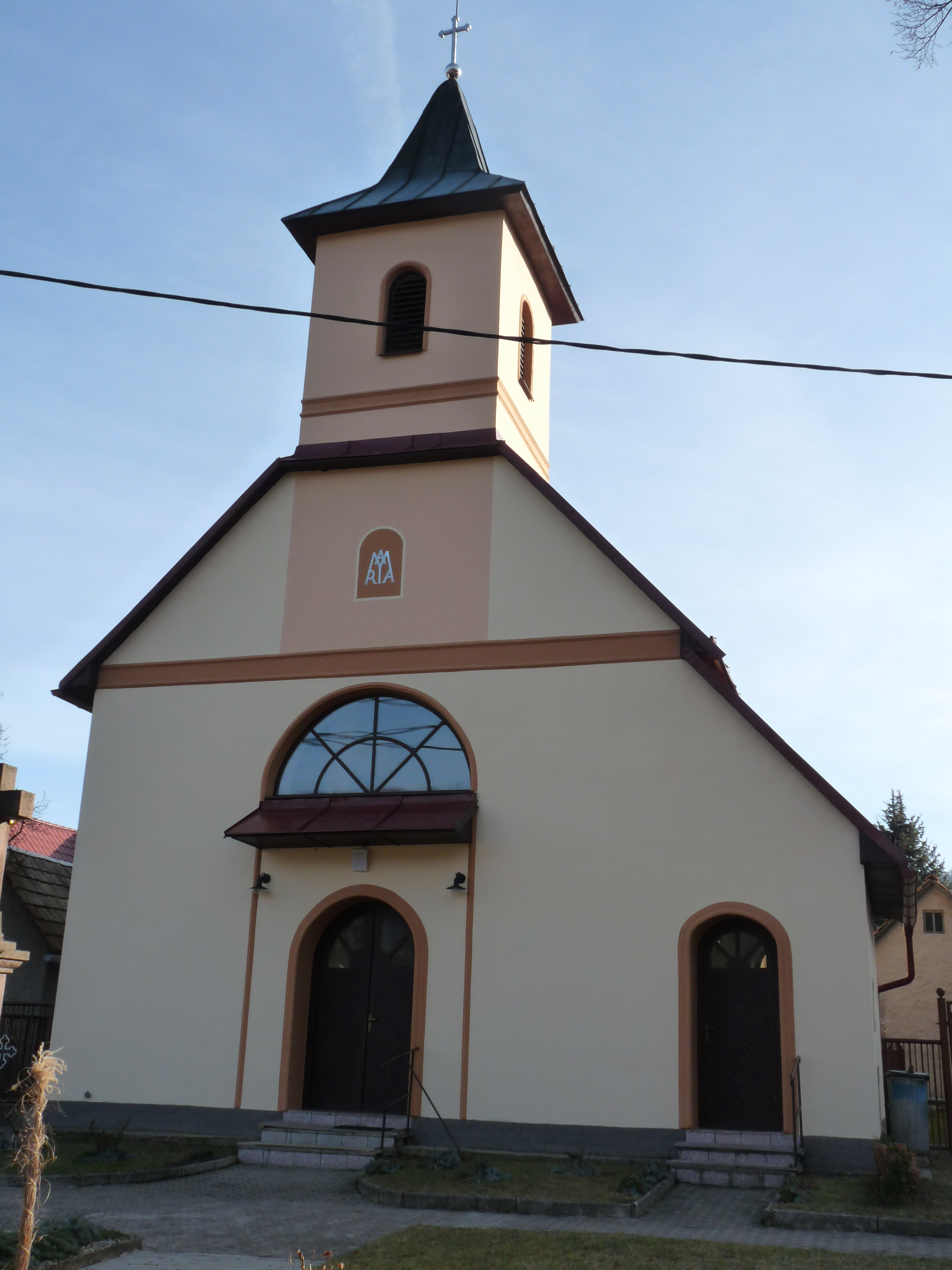 Kostol Ružencovej Panny Márie v Repišti